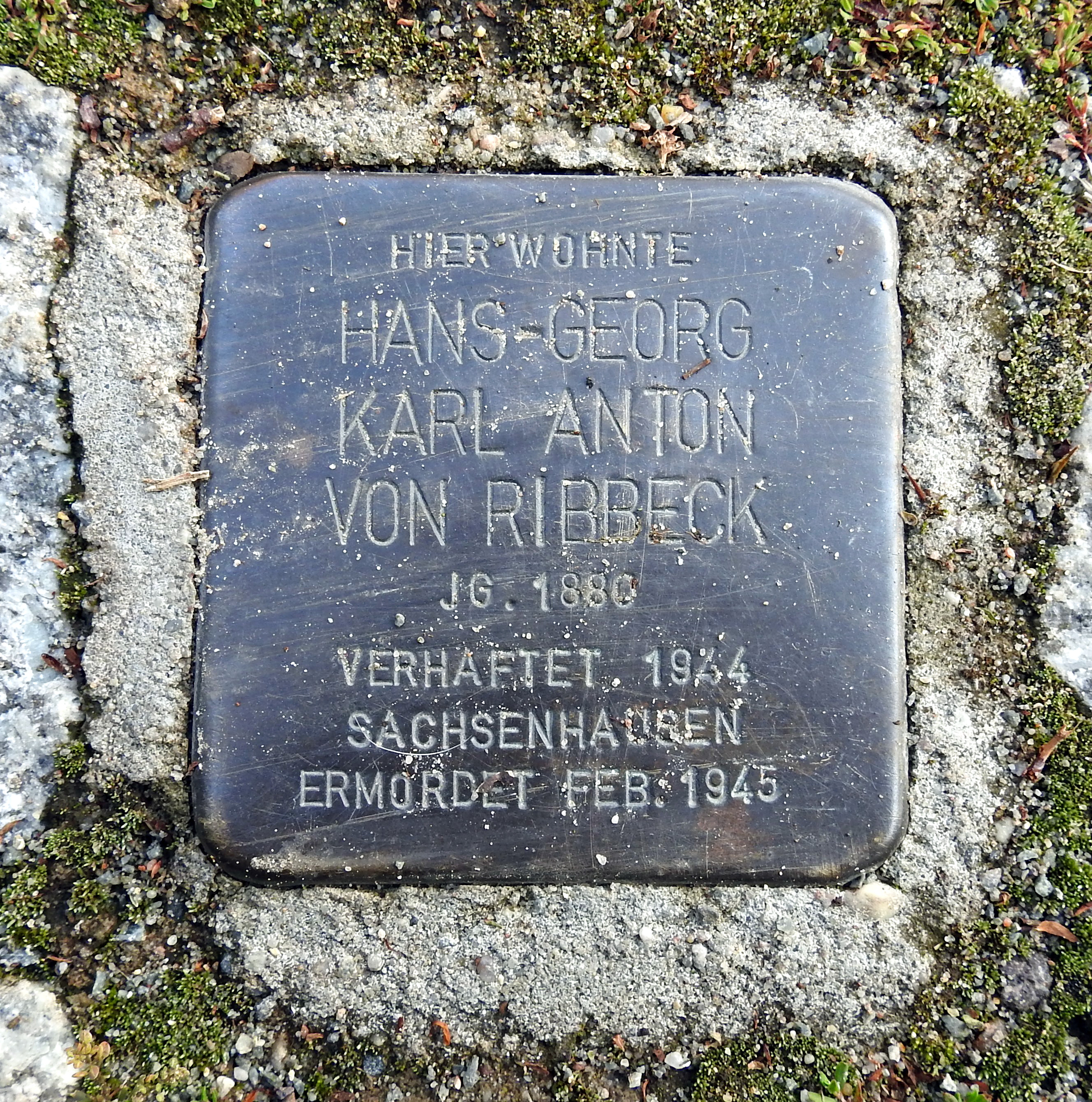 Stolperstein für Hans-Georg Karl Anton von Ribbeck in Ribbeck (Gemeinde Nauen, Land Brandenburg)